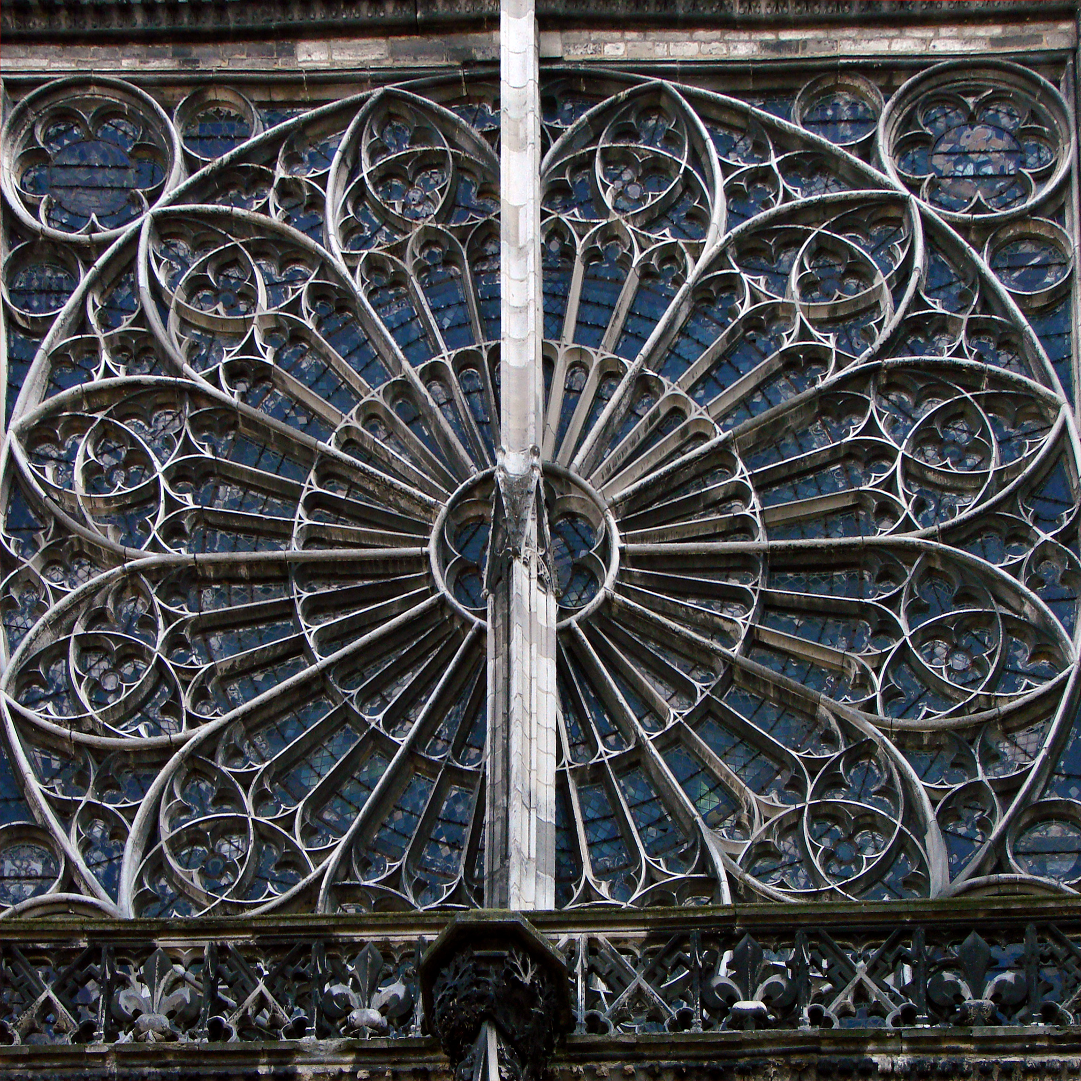 Rose du transept Nord (fin du 13ème siècle, consolidée au 15ème siècle par une aiguille de pierre). Cathédrale Saint-Pierre-et-Saint-Paul de Troyes.